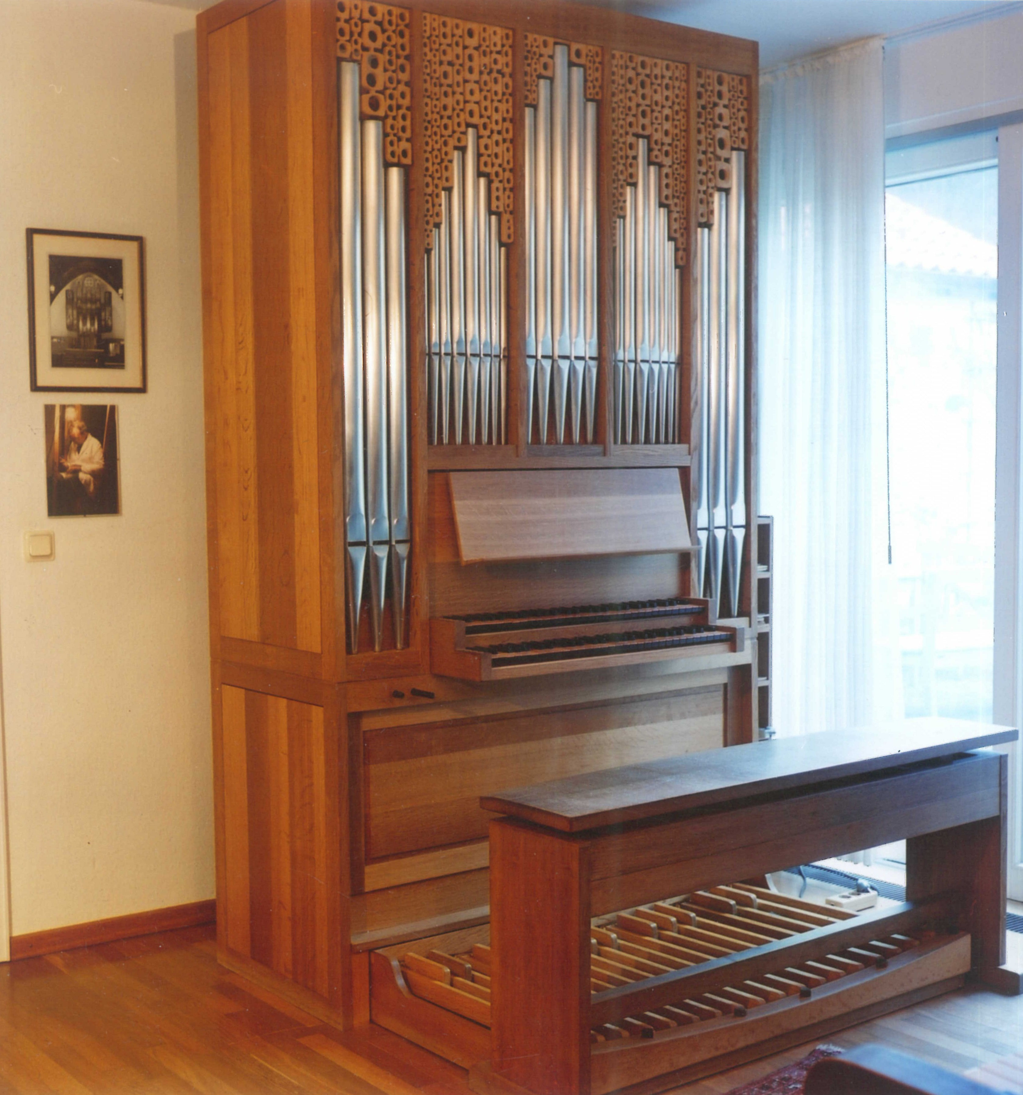 Hausorgel von Rudolf Janke, Northeim-Bühle